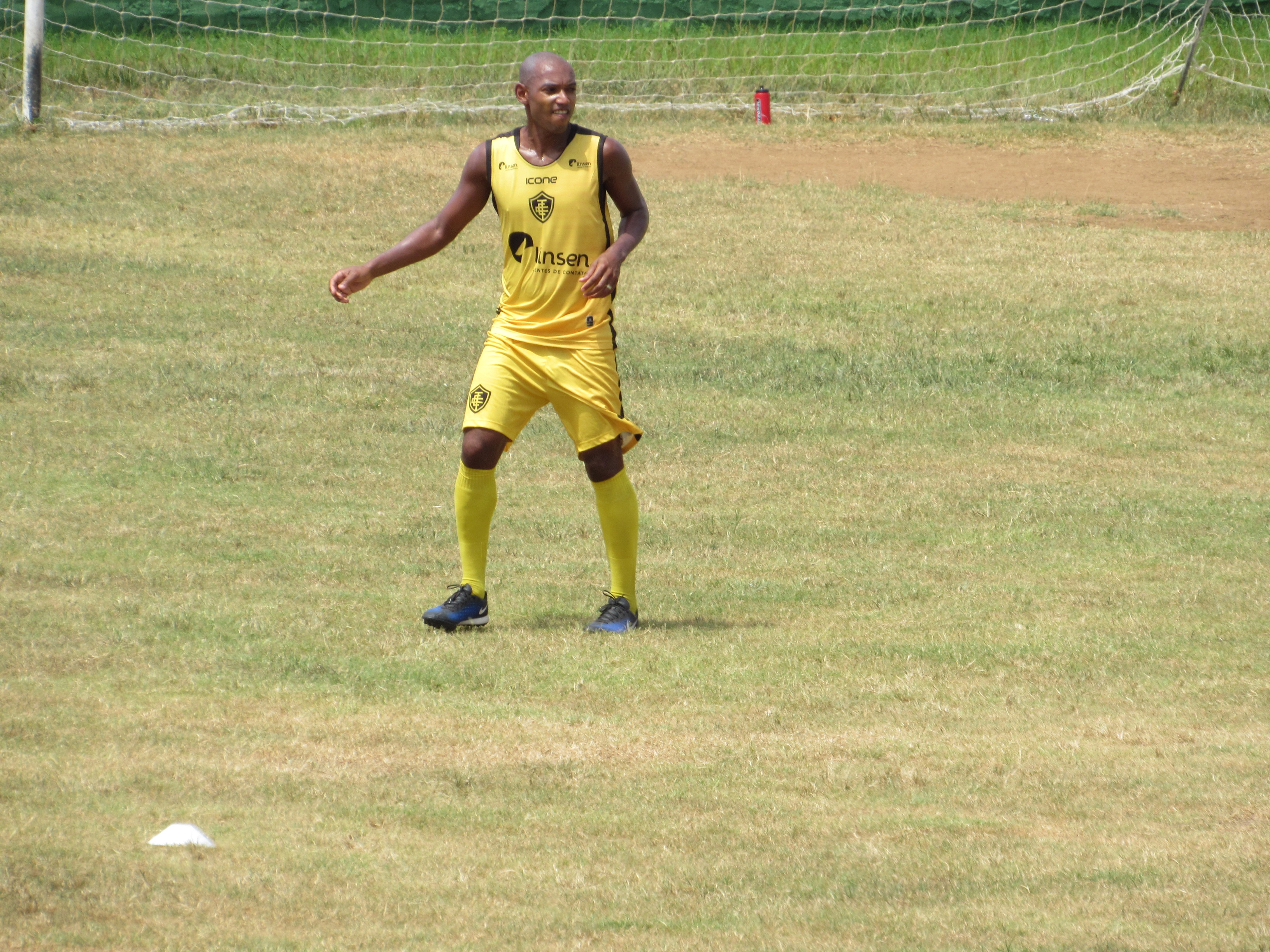 Português do Brasil: Luiz Alberto no treinamento do EC Tupy em 1 de fevereiro de 2017.